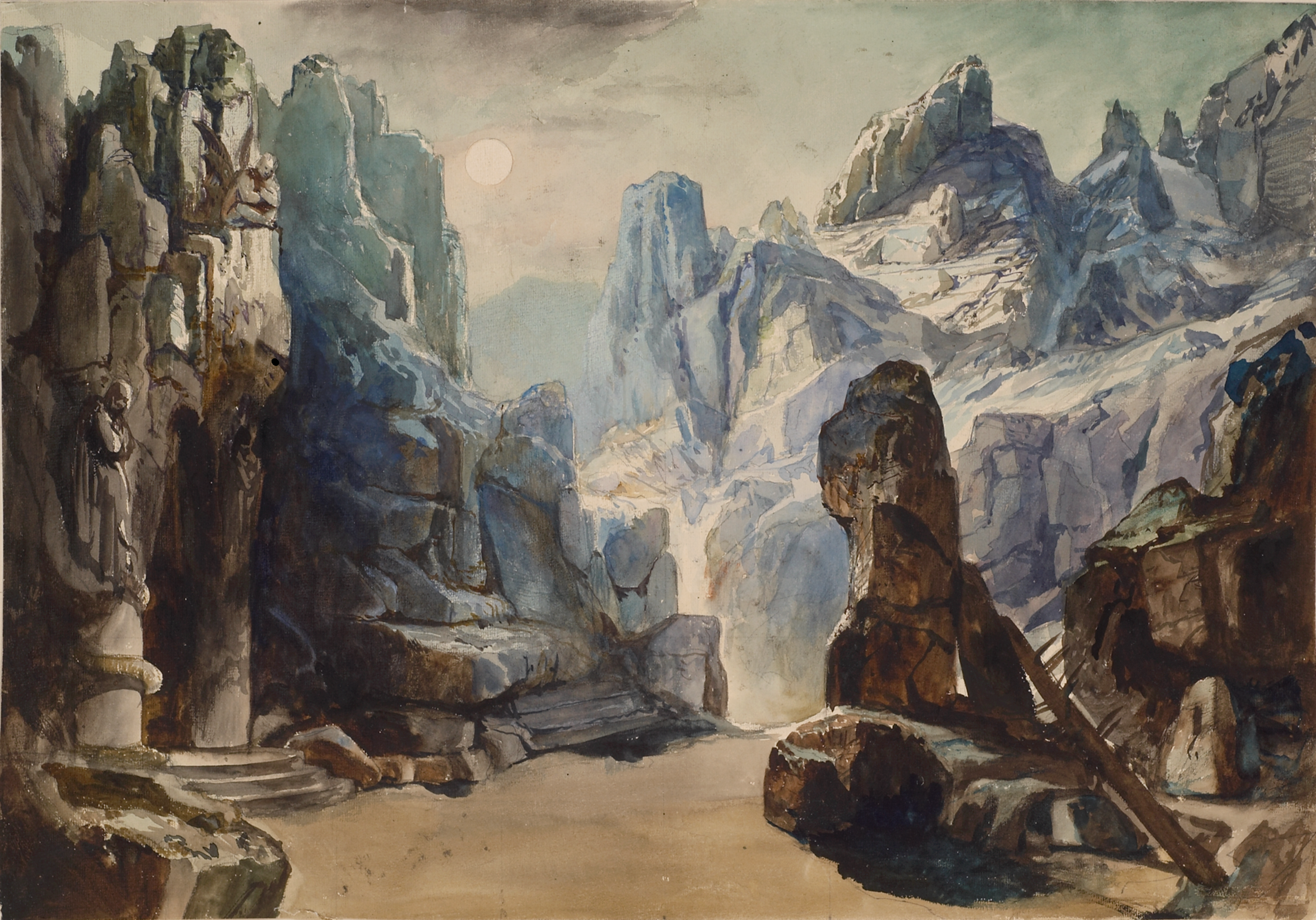 Felsengegend. Bühnenbild der Oper Merlin zur Uraufführung 1886 von Hermann Burghart